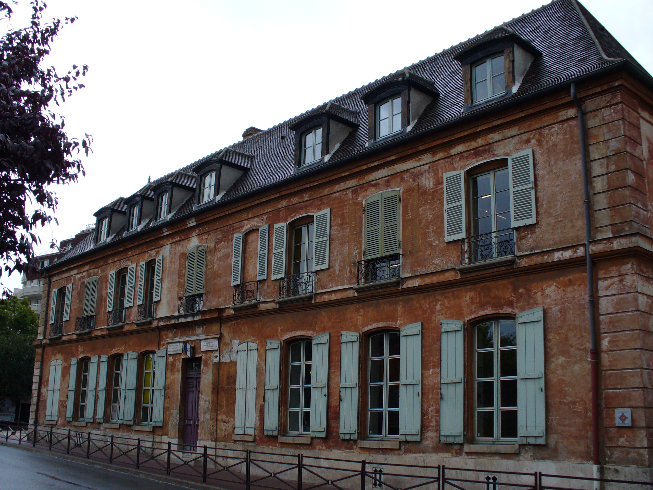 Maison natale du peintre Eugène Delacroix. Le peintre chilien Eudaldo y résida de 1977 à 1985. Actuelle bibliothèque de Saint-Maurice (Val-de-Marne).